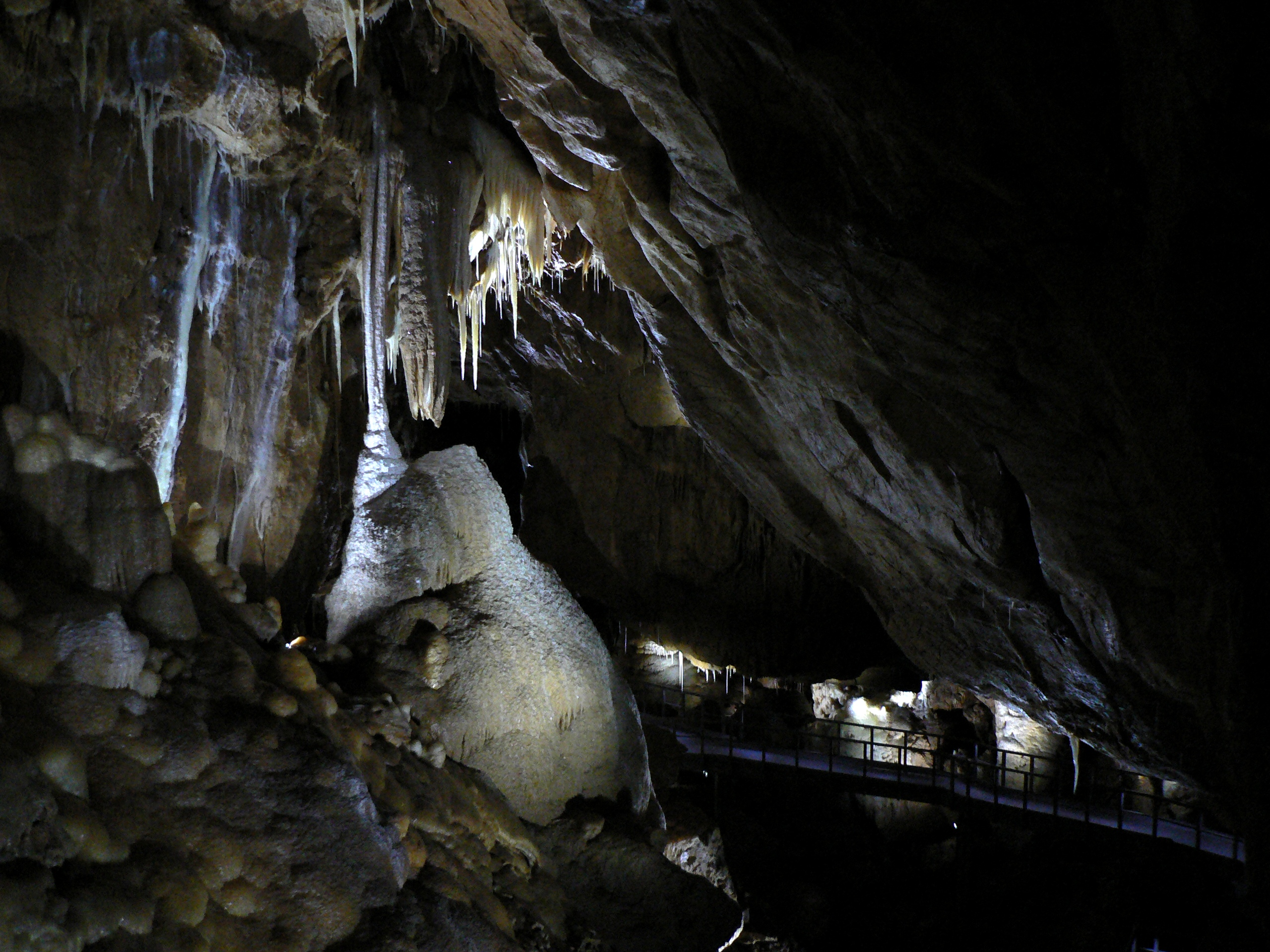 Herbstlabyrinth